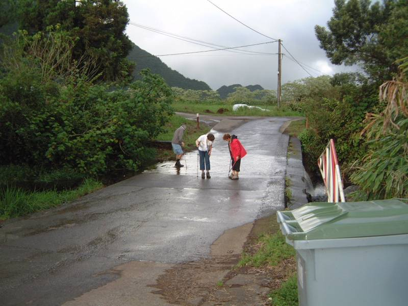 Passage d'un radier sur la rivière de la cascade du "Bireron" dans l'île de la Réunion.